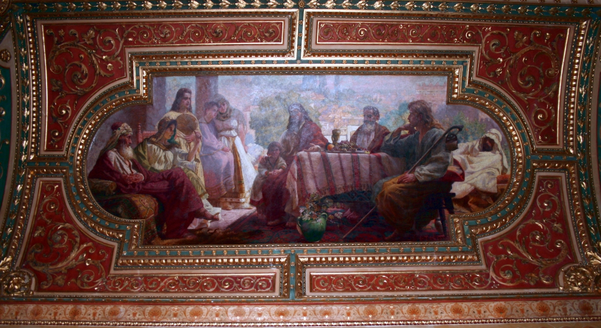 Nastava, rad Ivana Tišova u Hrvatskom institutu za povijest u Zagrebu